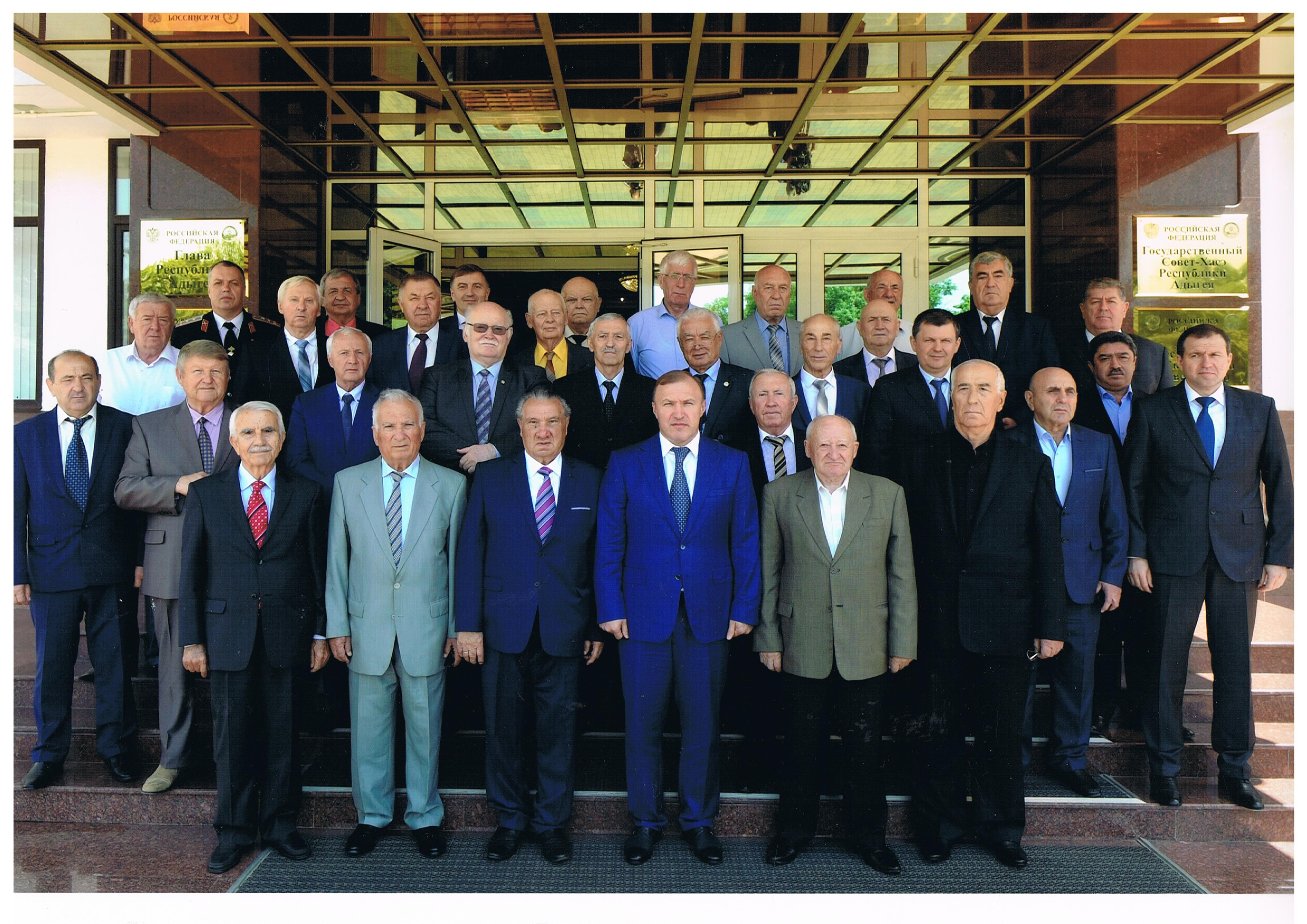 Машбаш И. Ш на приёме у Главы Адыгеи. 28.5.2018